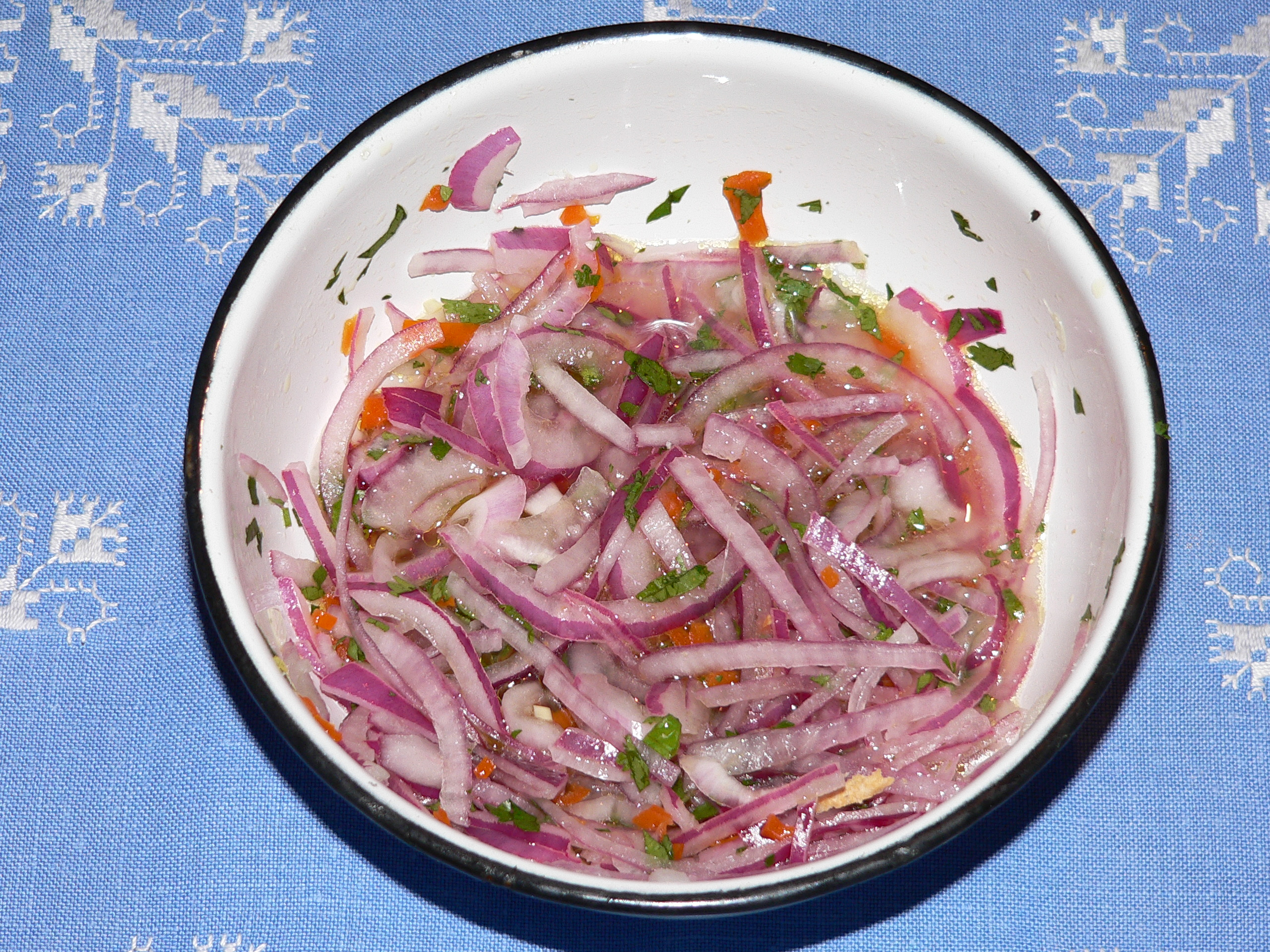 Descripción: Gastronomía del Perú Nombre: Salsa criolla País : Perú Fotógrafo: © Manuel González Olaechea y Franco Fecha : 11 de Noviembre de 2007